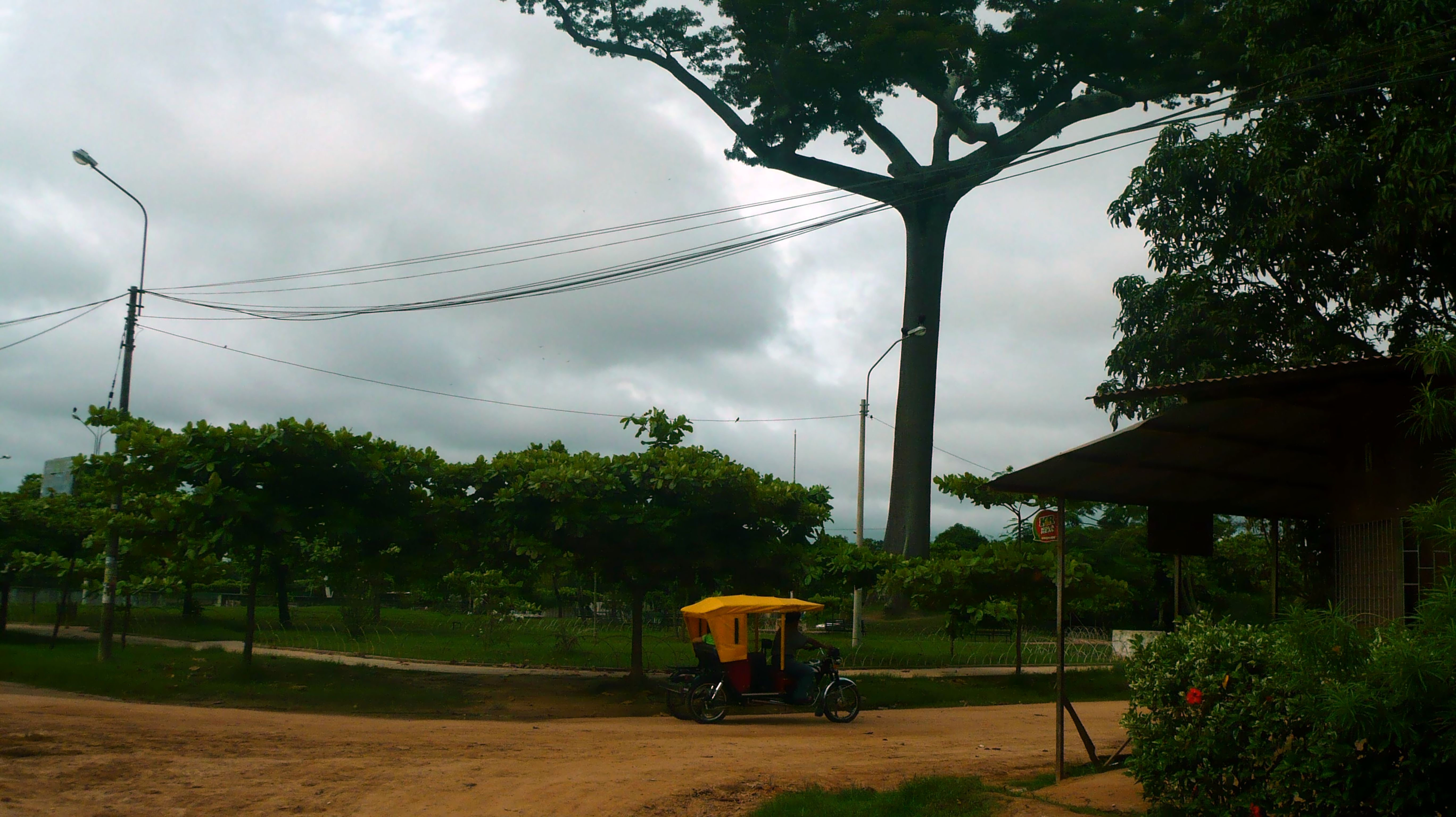 Vista lateral de Plaza La Lupuna (con ceiba pentandra), un árbol muy conocido pero no declarado como centro histórico. Fue centro de atentados terroristas en la década de los 1980 a 1990.